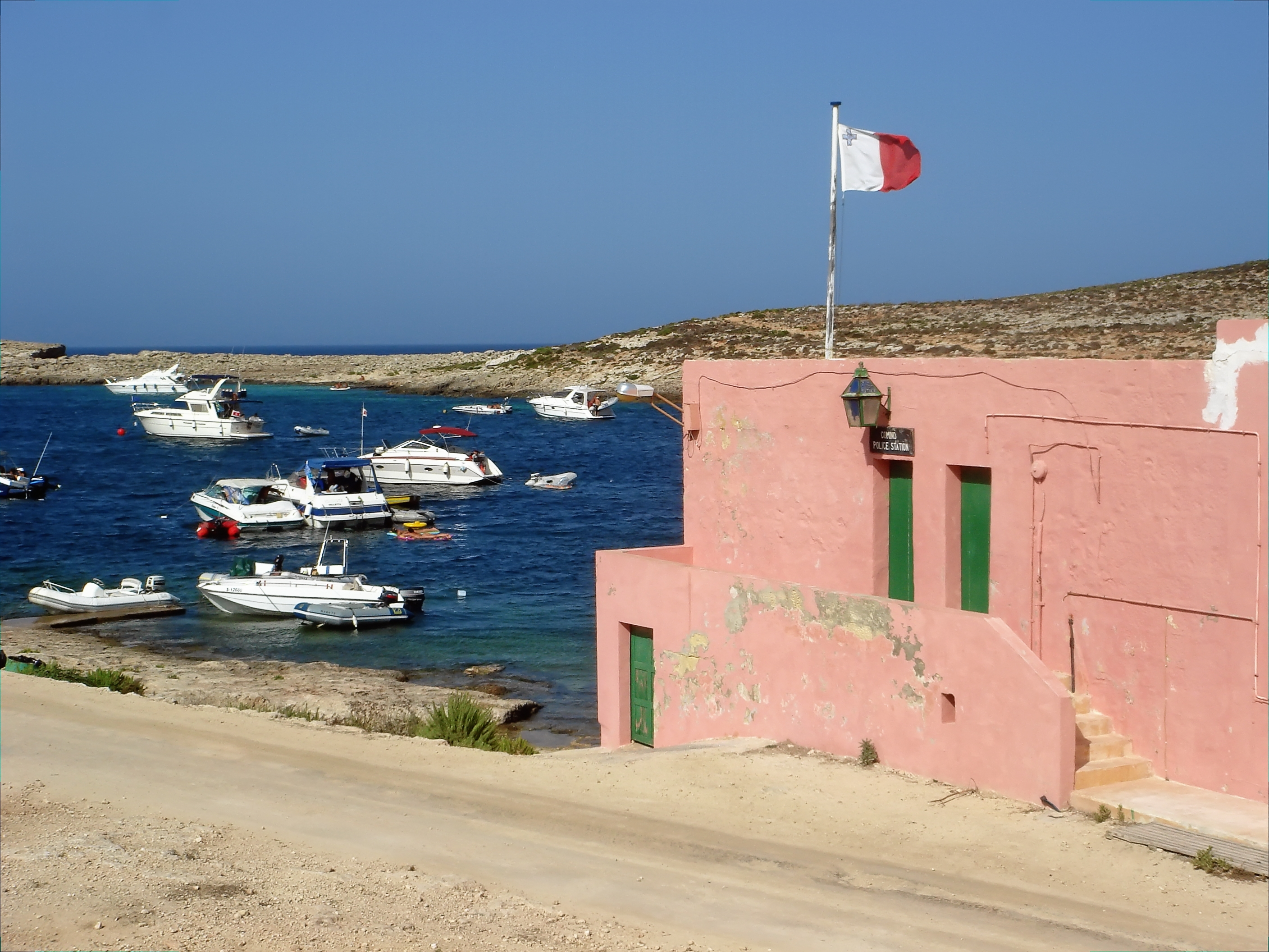 Police Station in Comino, Malta